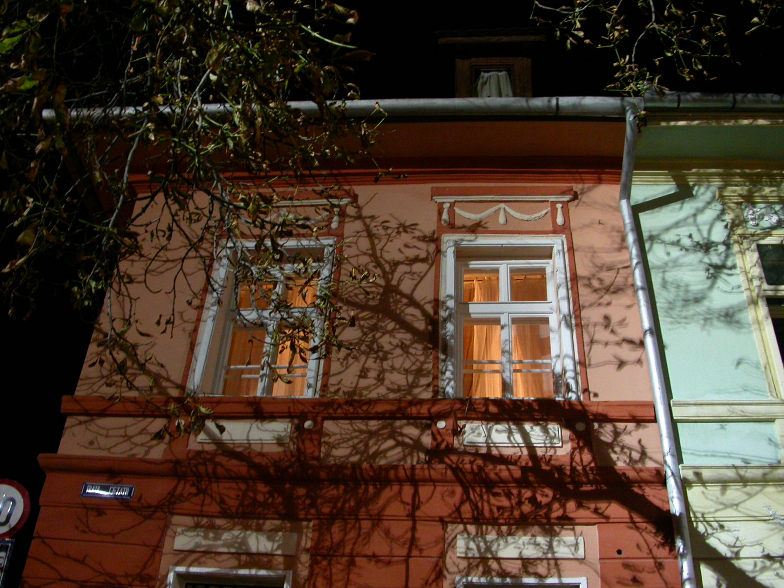 Casa Wagner, sec. XVIII